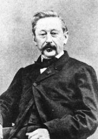 Conrad